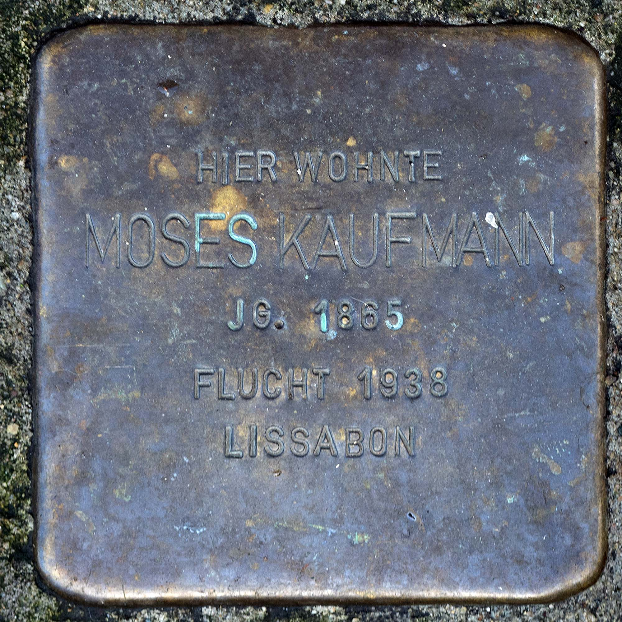 Stolperstein für Kaufmann Moses